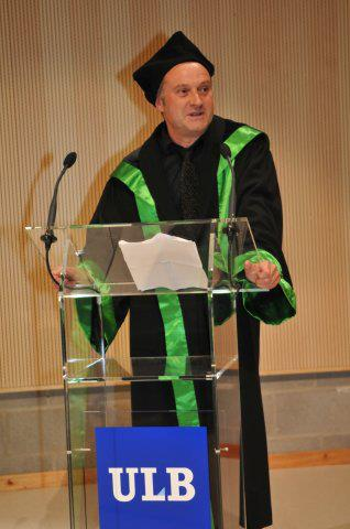 L'architecte belge Francis Metzger à la séance de remise des distinctions Docteur Honoris Causa à l'ULB, Belgium